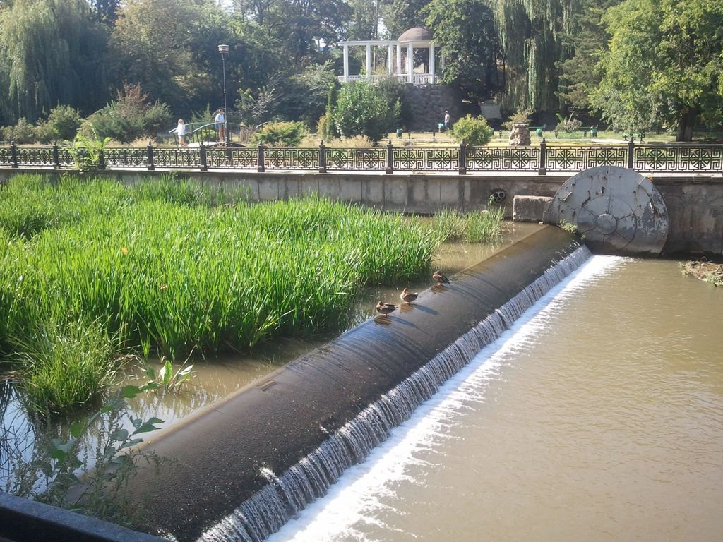 Подъемная перекатная плотина на центральной набережной Симферополя. Центральная площадка парка культуры и отдыха "Екатерининский сад". 2018 год.